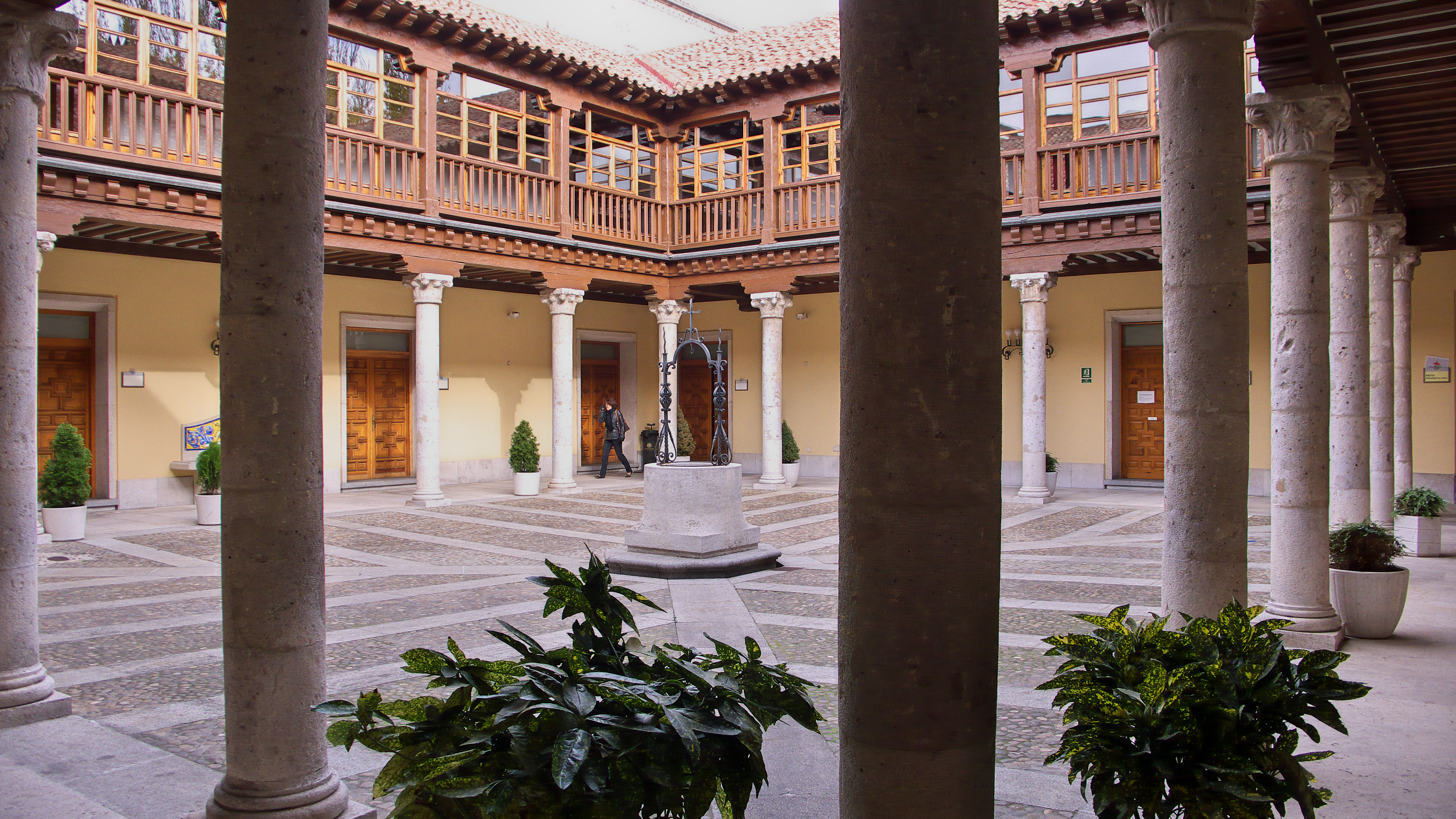 Patio del siglo XVI. En este palacio nació el rey Felipe II, el día 21 de mayo de 1527.